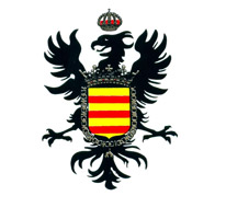 Escudo oficial de Aguilar de la Frontera